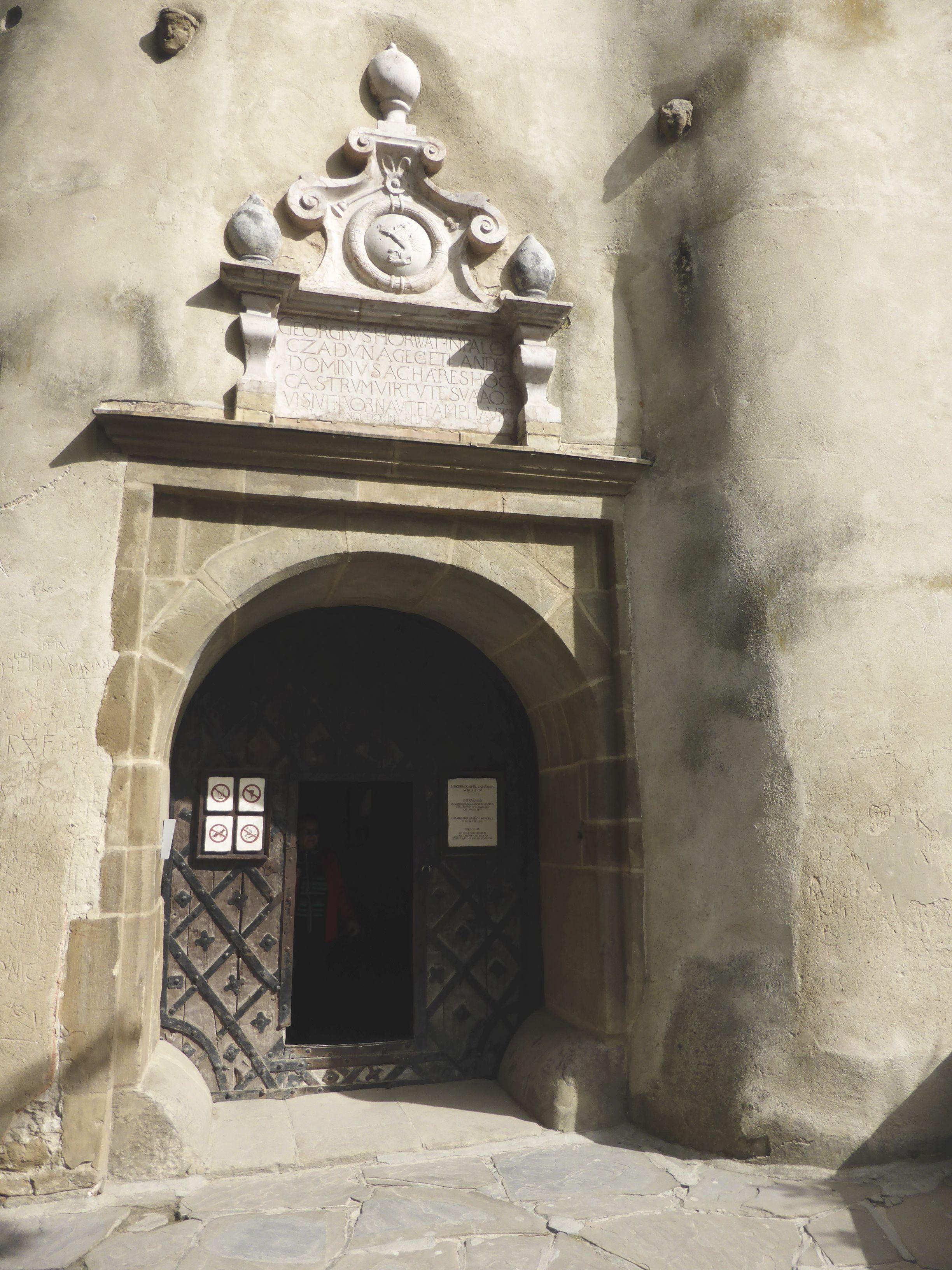 Niedzica Castle - Eingangsportal